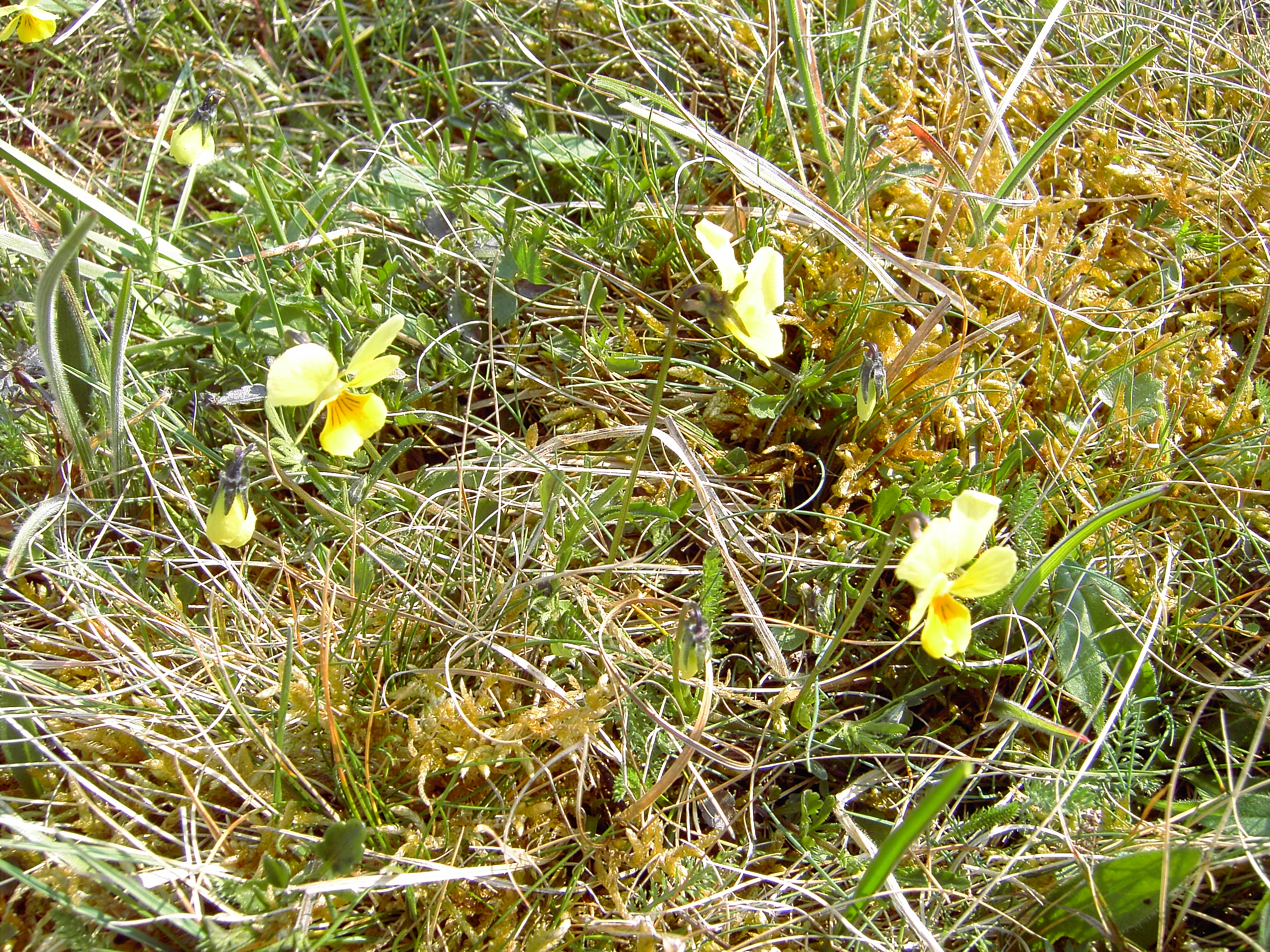 Foto von Galmeiveilchen